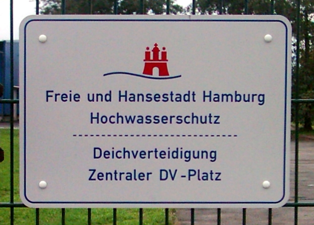 Zentraler DV-Platz Deichverteidigung, Hamburg.